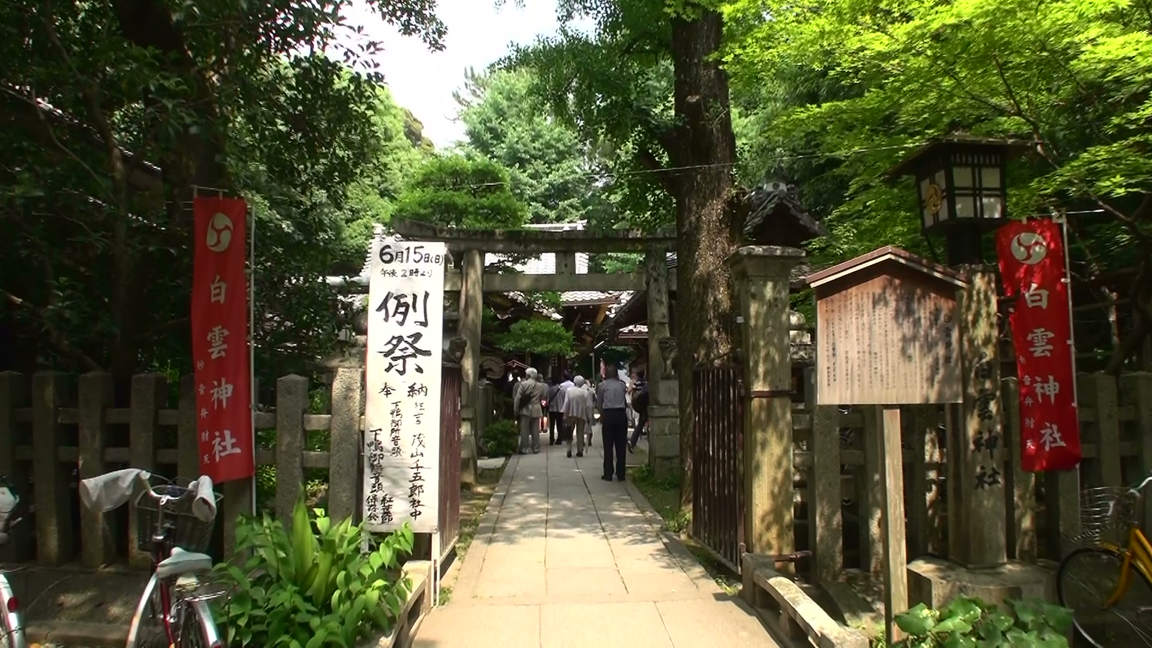 白雲神社（京都市上京区京都御苑）